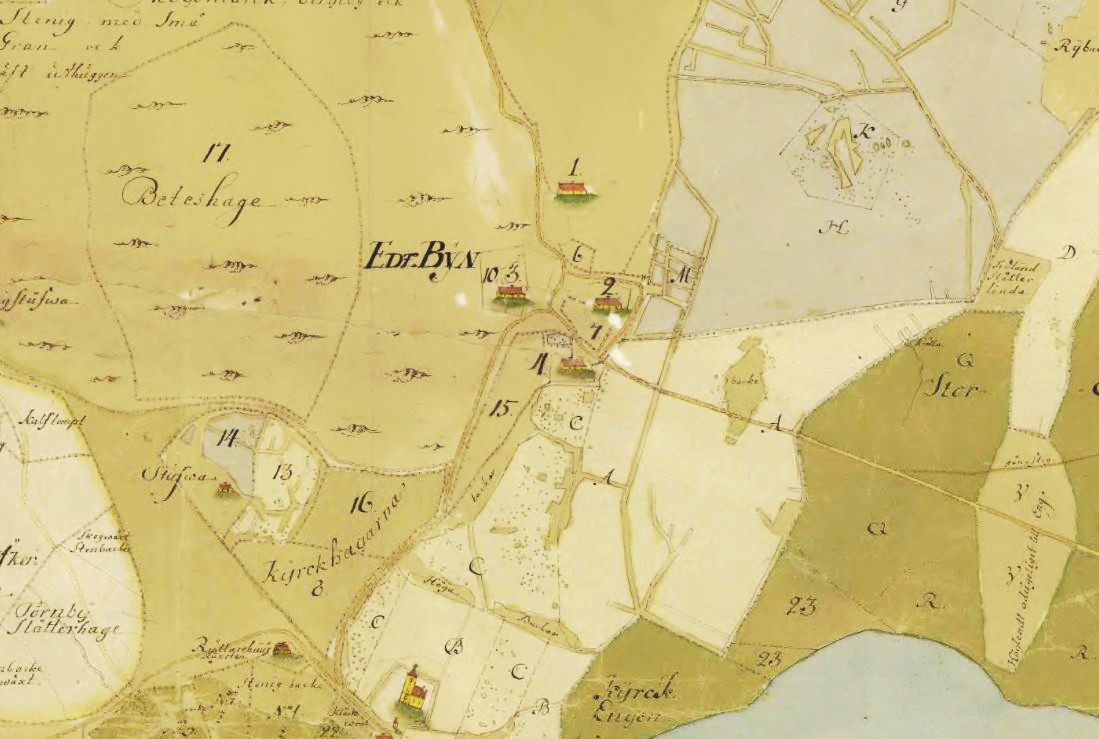 Eds socken Edsbyn nr 1-4, Ägomätning (del av karta)